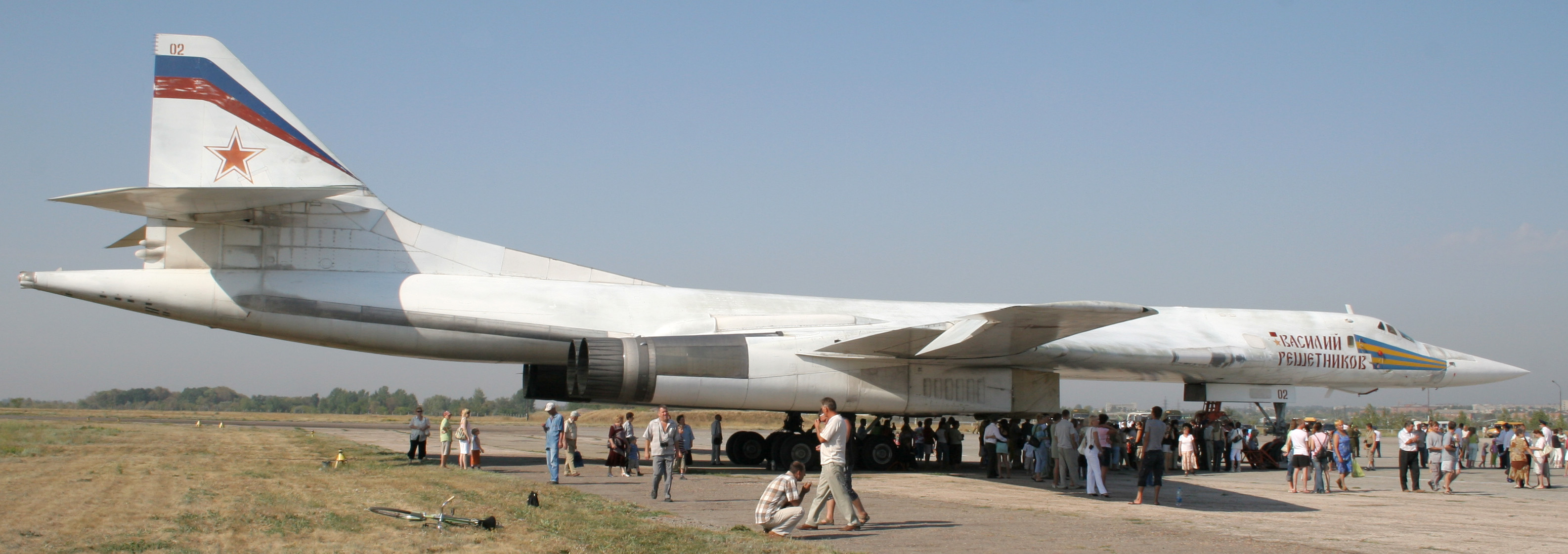 Самолёт Ту-160 бортовой номер 02 «Василий Решетников» на авиабазе Энгельс